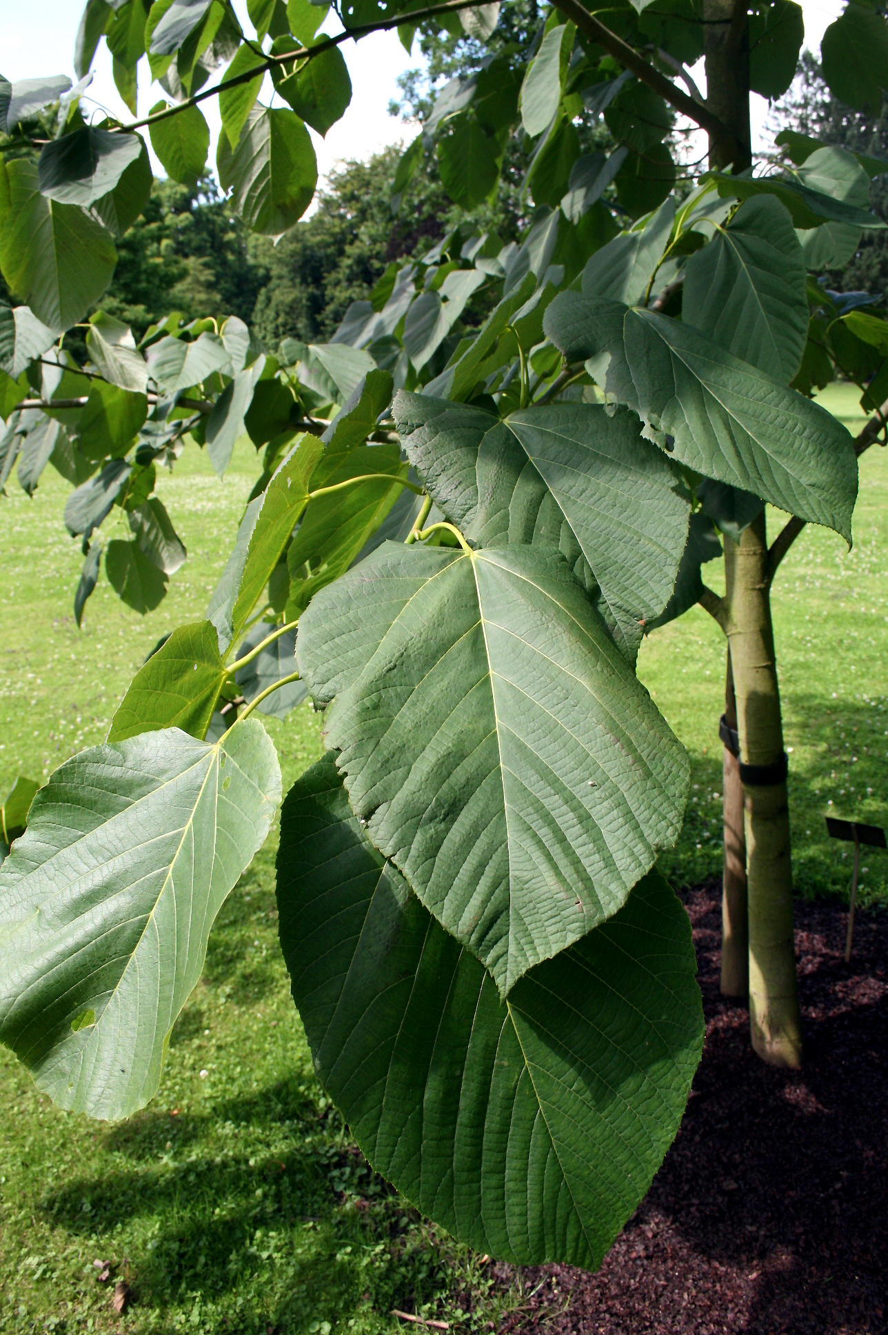 Feuilles et tronc d’un jeune Tilia heterophylla Vent. (syn. T. americana var. heterophylla, T. monticola Sarg.) Position exacte : Meise (Belgique) – Jardin botanique National de Belgique.